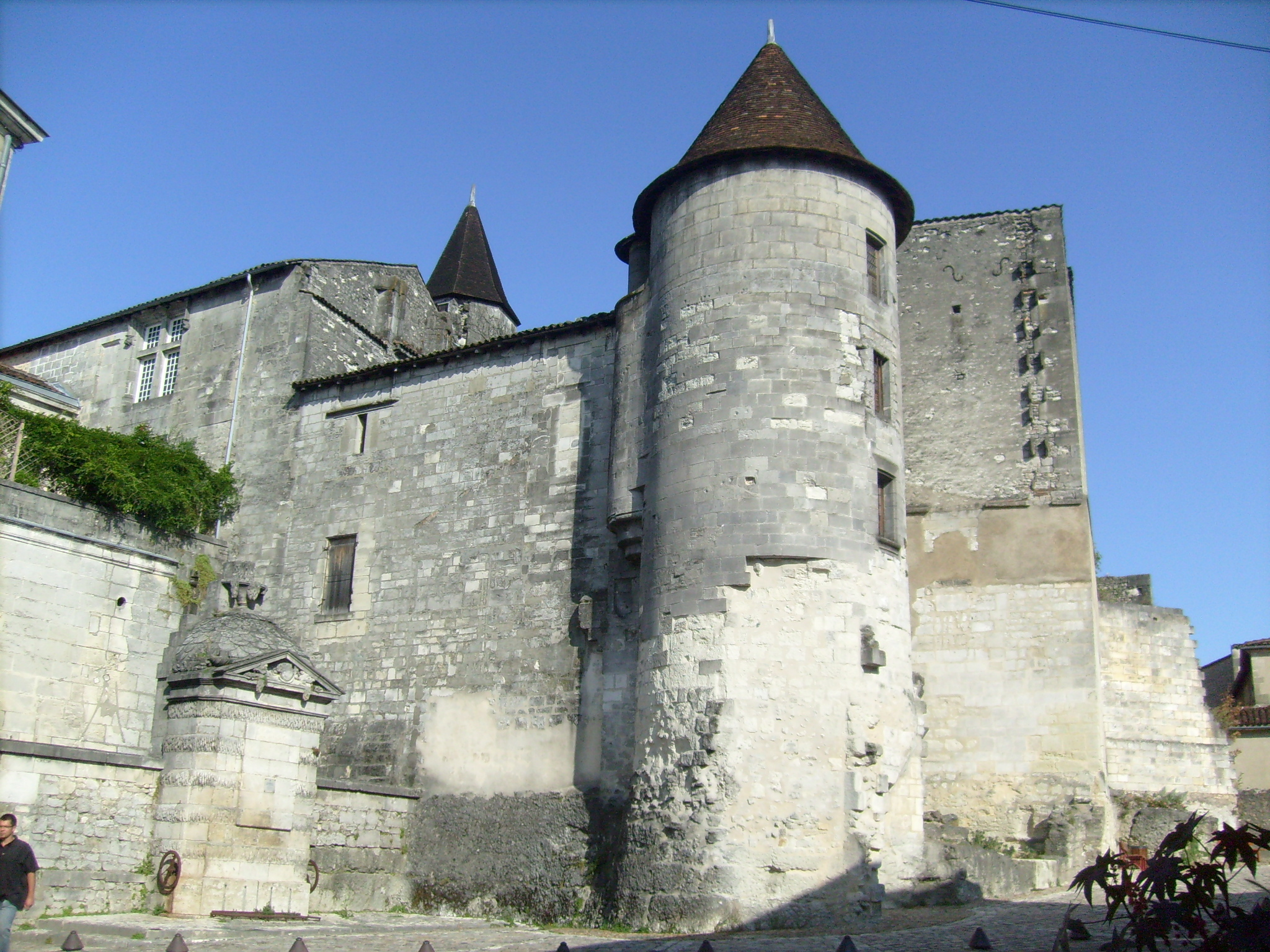 Le château des Valois, lieu de naissance du roi François Ier